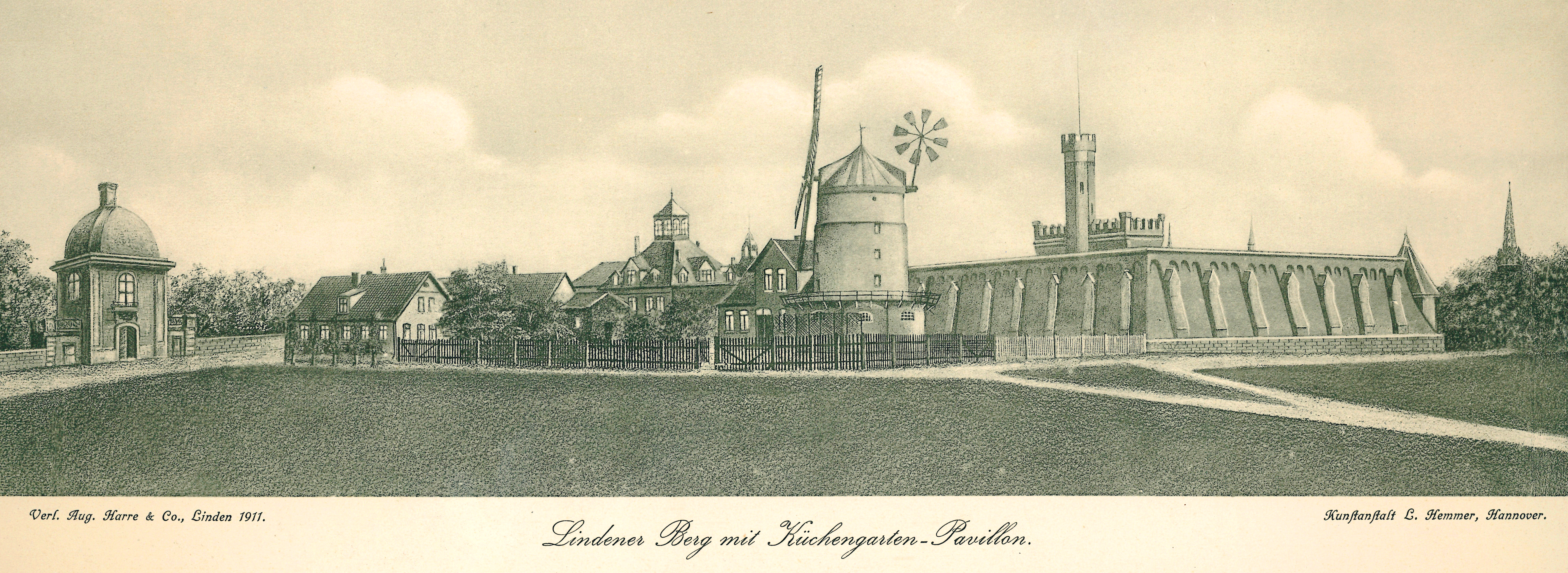 Unter dem Titel „Lindener Berg mit Küchengarten-Pavillon“ gab die Kunstanstalt Ludwig Hemmer im Verlag August Harre & Co. in Linden 1911 diese Ansicht der Bergkuppe mit einem Blick von Südwesten heraus. Der Küchengarten-Pavillon war im selben Jahr an seinem ehemaligen Standort an der Fössestraße gegenüber der Einmündung der Pavillonstraße schonend abgebrochen worden und sollte dann am höchsten Punkt des Lindener Bergfriedhofs wieder aufgerichtet werden. Ludwig Hemmer hat in seiner Darstellung hier den Pavillon schon 1911 vorab auf den Berg gezeichnet, allerdings nicht an seinem späteren wahren Standort, sondern direkt in die Friedhofsmauer an der Straße Am Lindener Berge hinein. Etwa in der Bildmitte ist die noch mit Flügeln und Rundumgang ausgestattete jahrhundertelang in Gebrauch gewesenen Windmühle zu sehen. Etwas weiter links dahinter steht das neue Berggasthaus (heute: Jazz Club Hannover) mit der ehemaligen Panoramahaube; das Gebäude diente zunächst als Ersatz für das 1825 von Laves für Johann Egestorff errichtete alte Berggasthaus dienen sollte. Das ältere Berggasthaus musste dem in der rechten Bildhälfte zu sehenden, 1876 bis 1878 erbauten Wasserhochbehälter weichen. Dort ragt obenauf noch der bergfriedartige Turm vor dem noch intakten Dachaufsatz der späteren Volkssternwarte empor. Ganz rechts schaut die alte Spitze des Kirchturmes der St. Martins-Kirche über den Baumbewuchs hervor ...